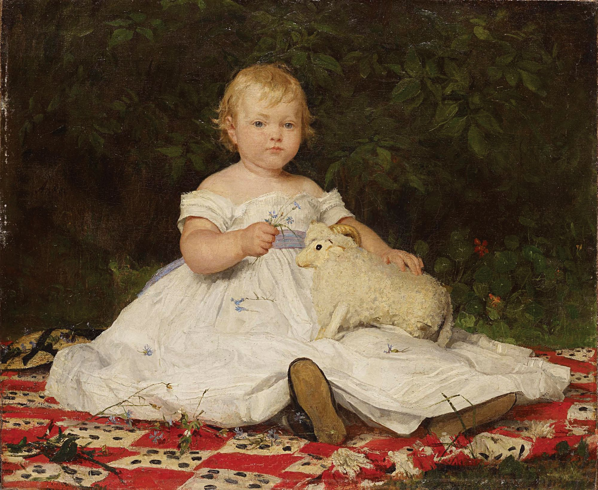 mit Plüschtier